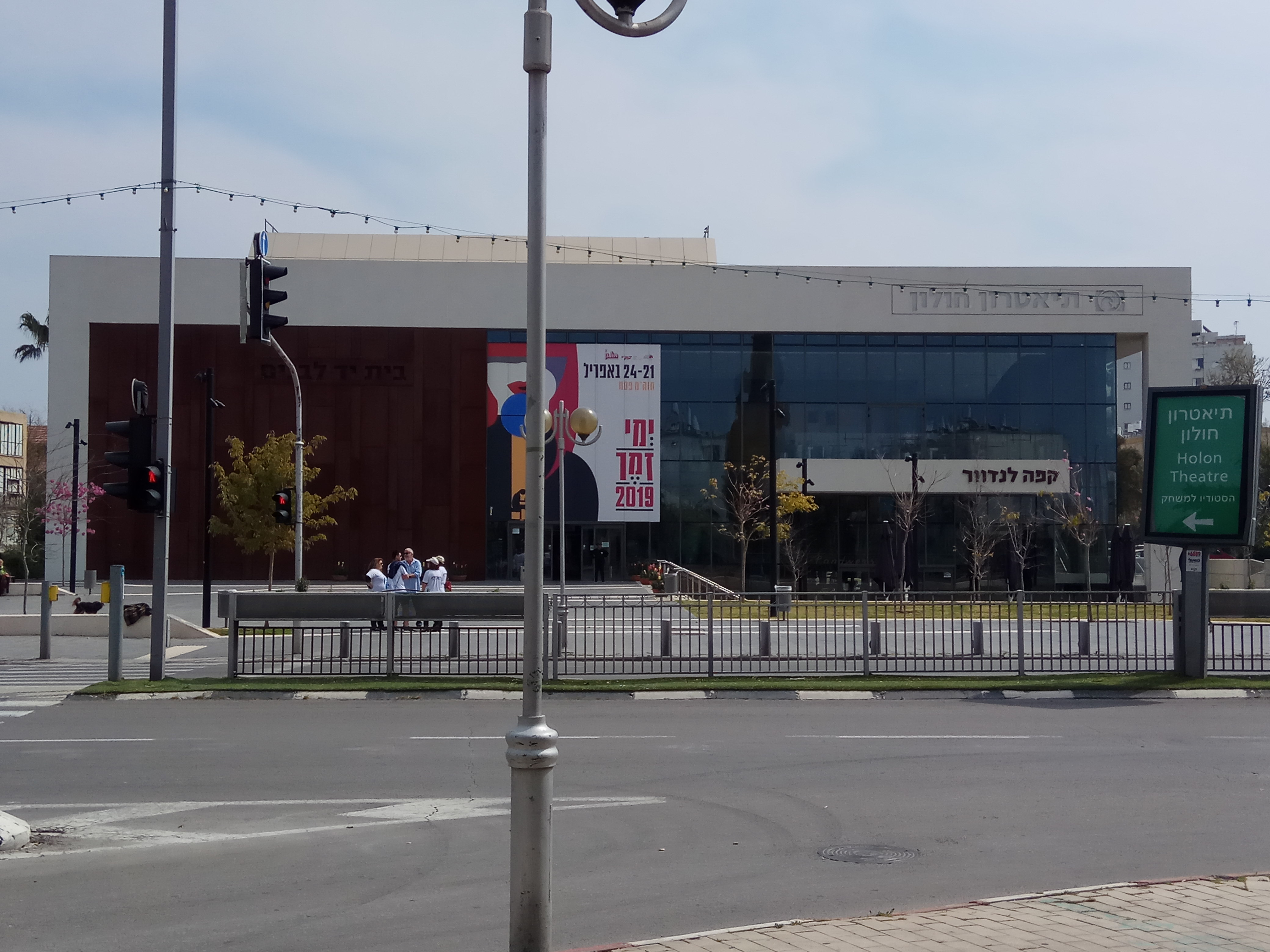 תיאטרון חולון ויד לבנים בחולון